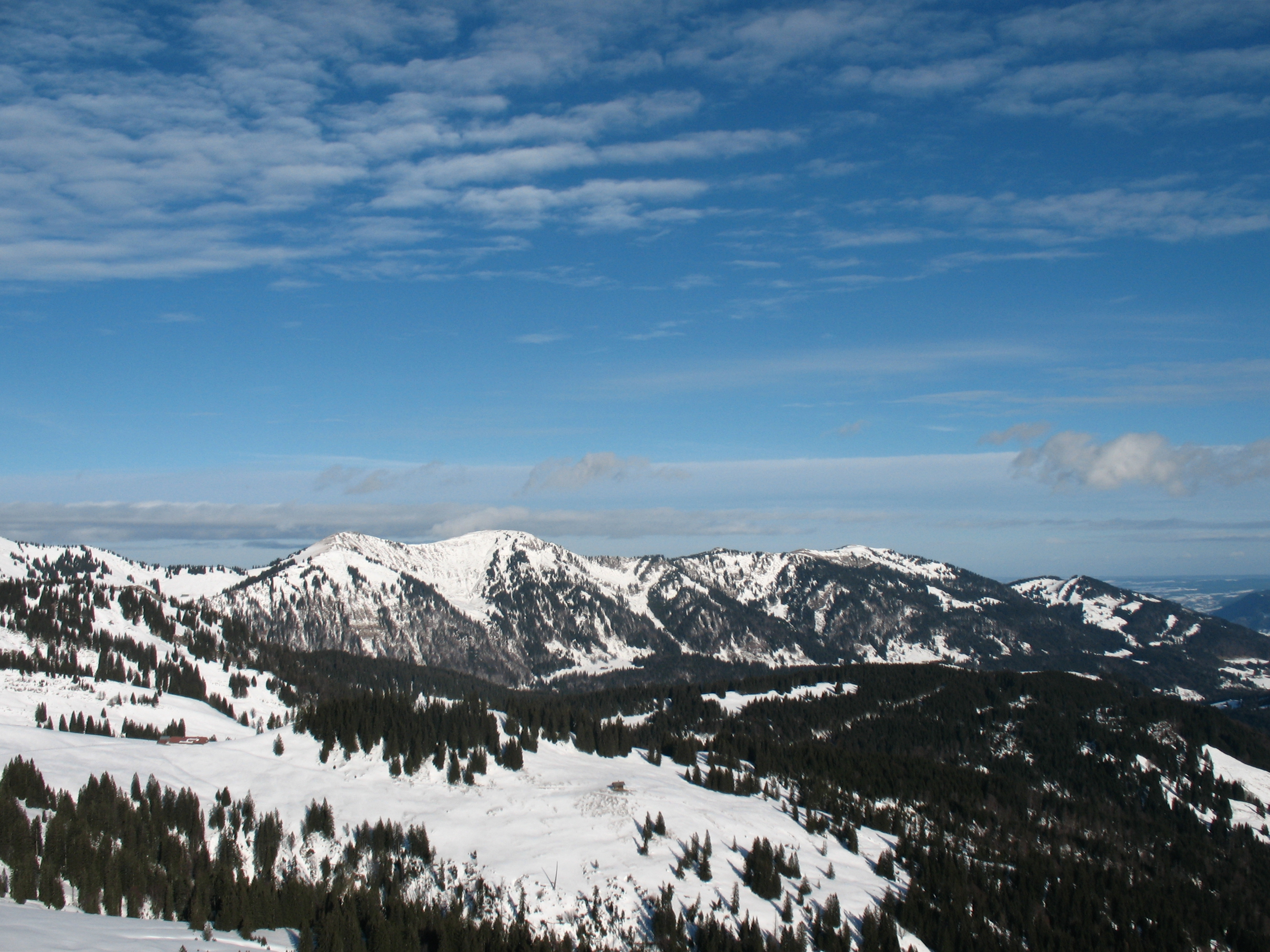 Blick vom Dreifahnenkopf nach Norden auf den Ost-Teil der Nagelfluhkette: Sedererstuiben (1737 m), Stuiben (1749 m), Steine- (1660 m) und Mittagberg (1451 m).